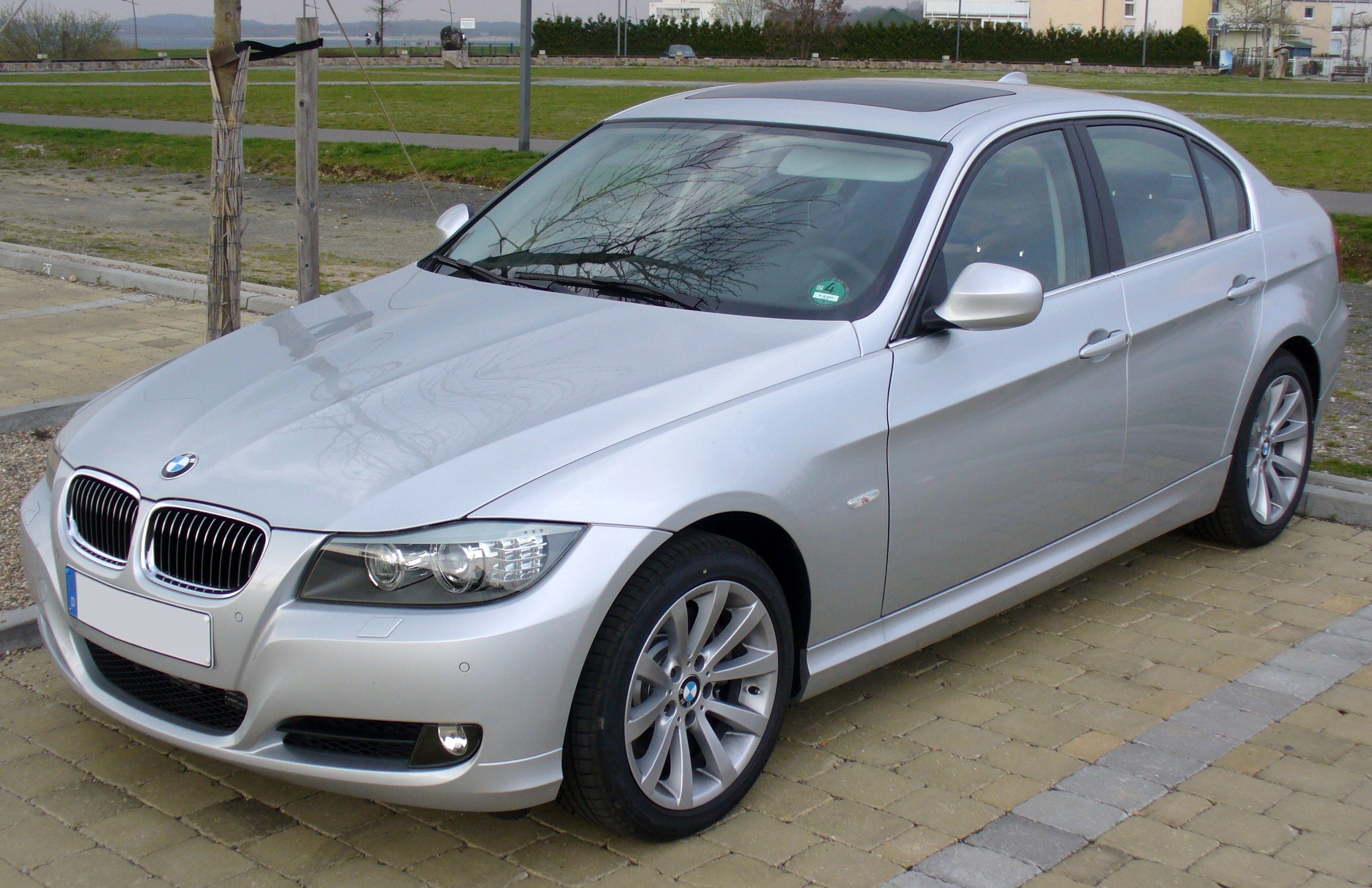 BMW 330d